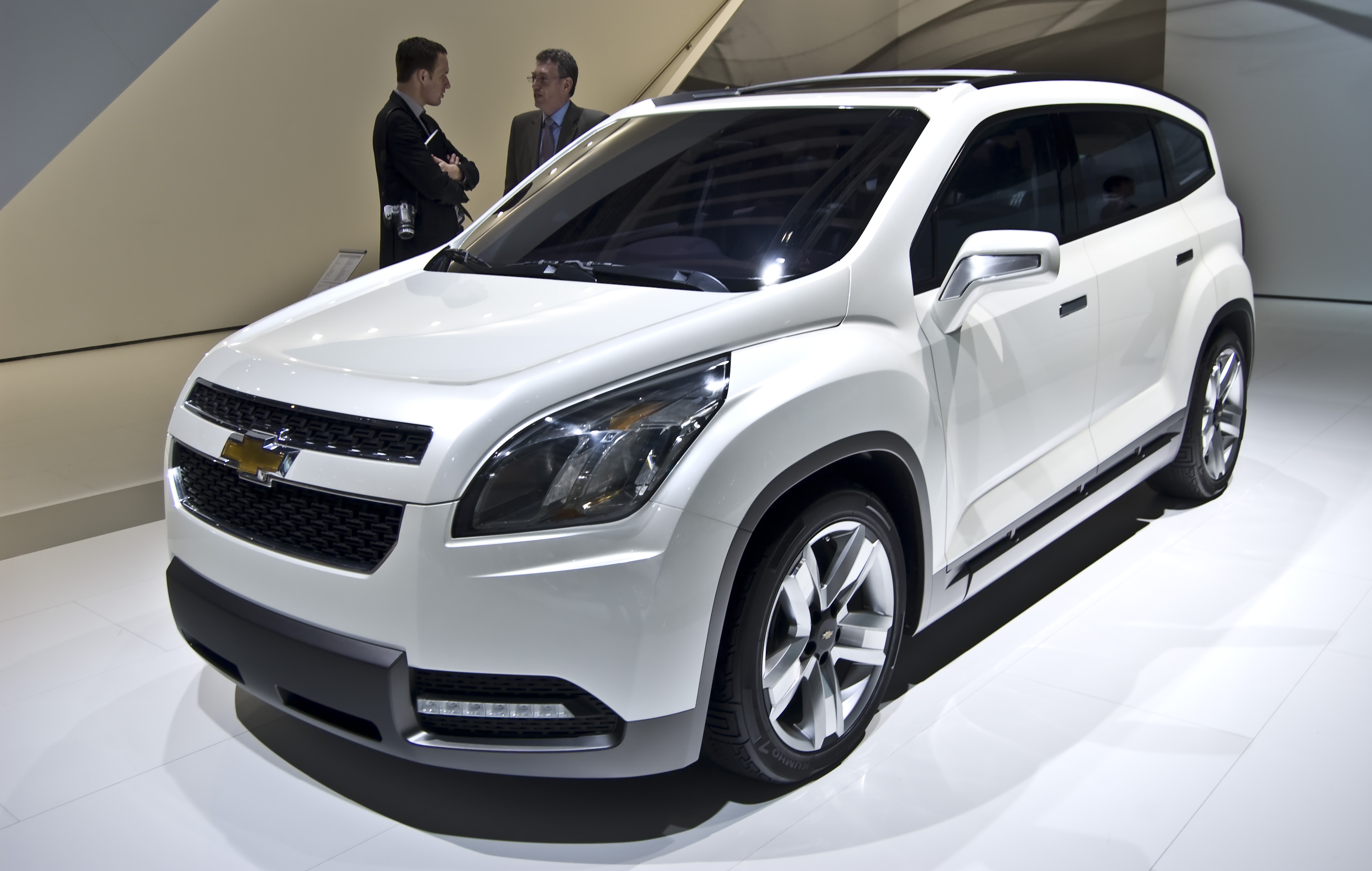 Chevrolet Orlando Concept en el Salón de Ginebra 2010.